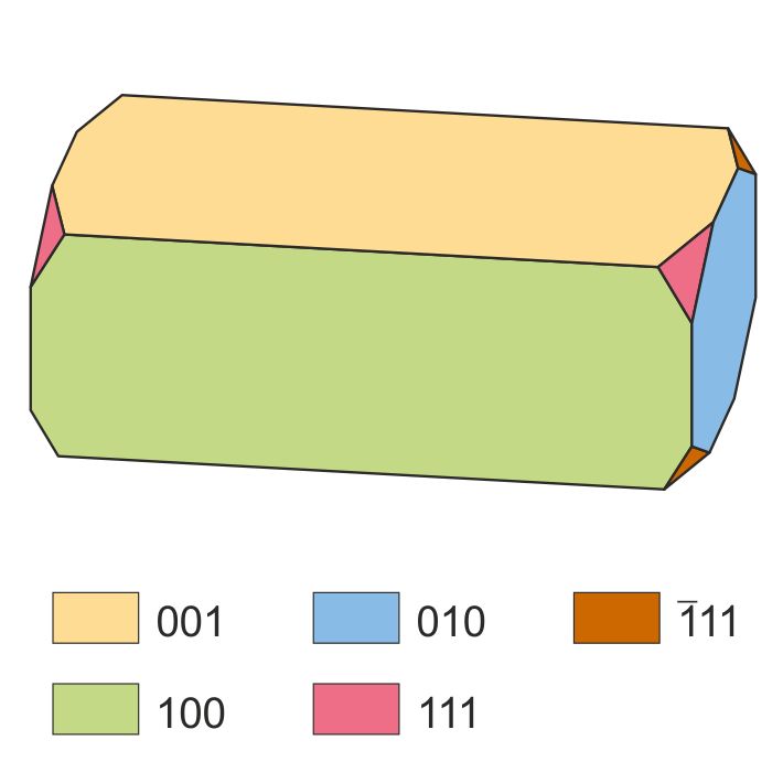 Kristallzeichnung eines Lasalit-Kristalls unter Zugrundelegung einer Vorlage von John Rakovan in Steffen Jahn (2009): „Neue Mineralien 2008“. - Mineralien-Welt 20 (3), Seite 86.